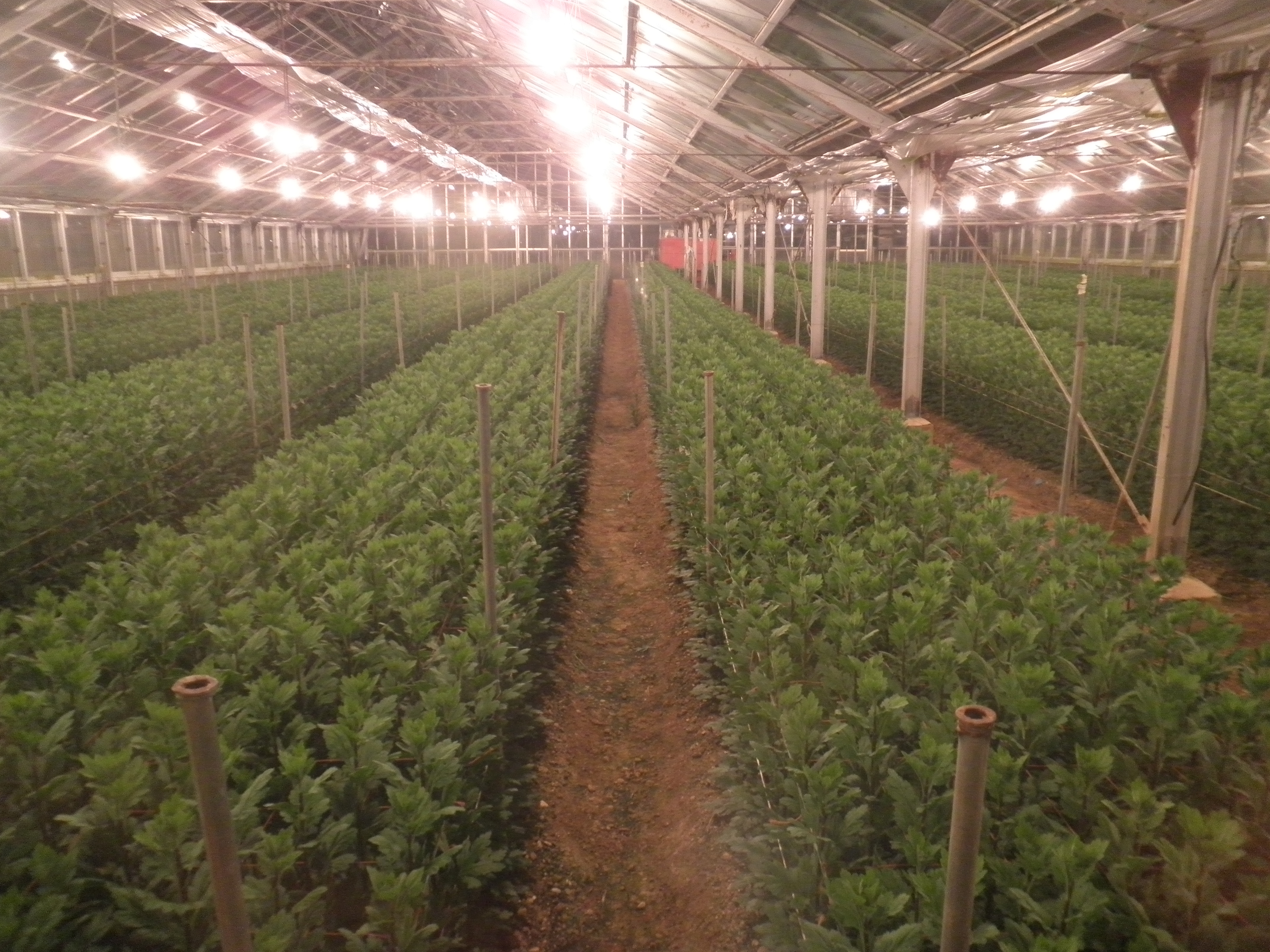 愛知県田原市にある電照菊のビニールハウス。赤羽根町域で撮影。